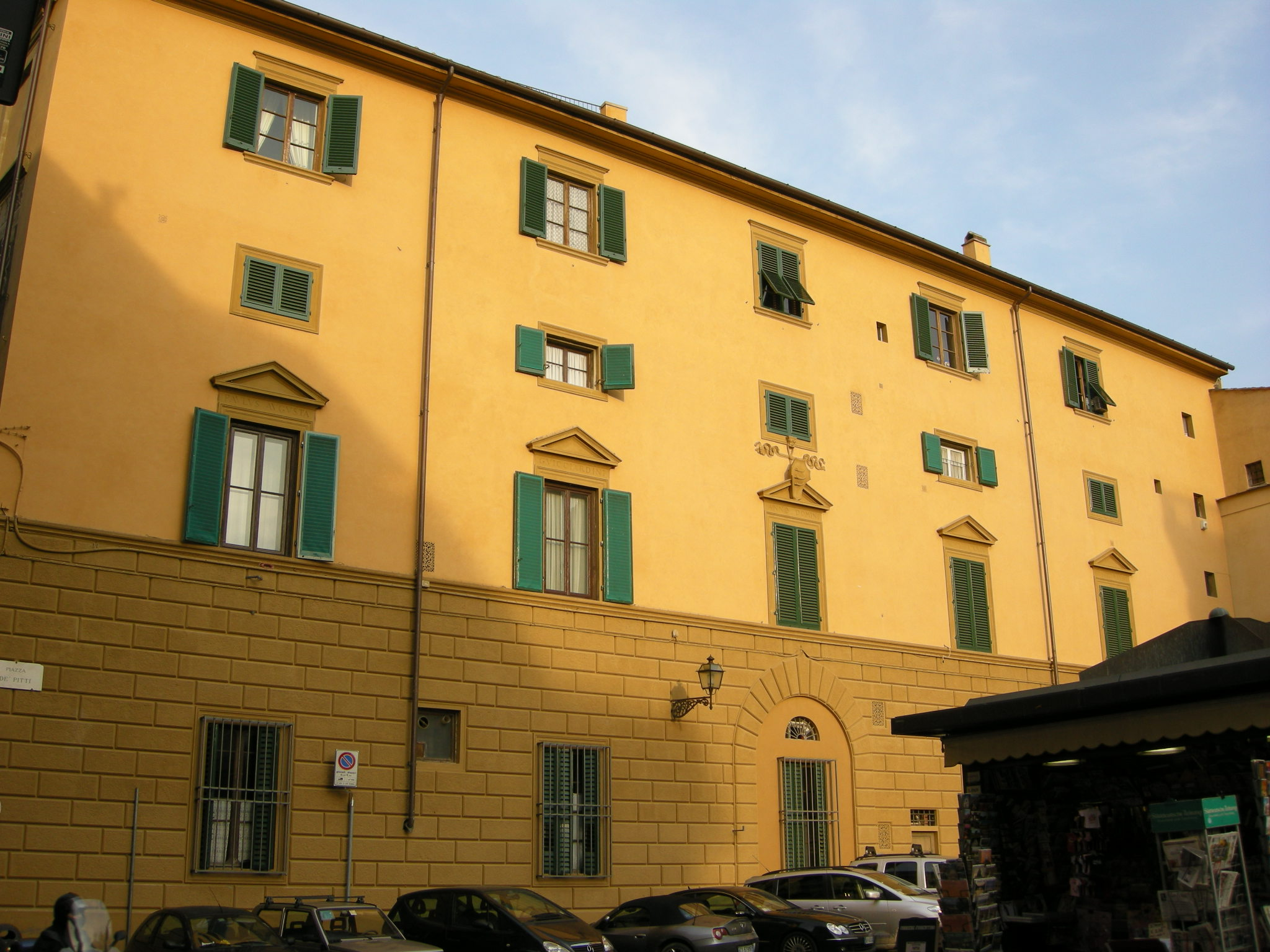 Palazzo guicciardini ext